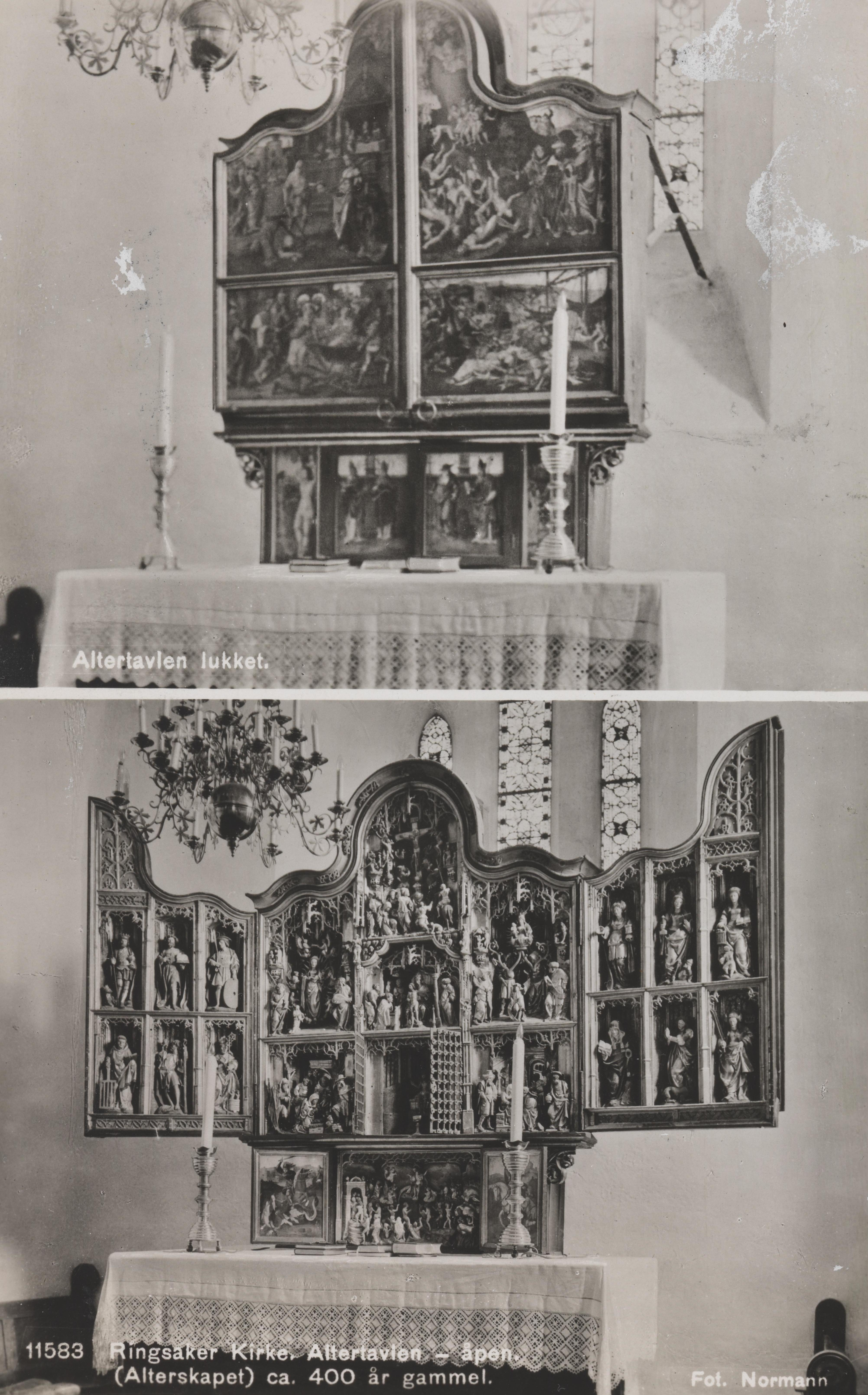 Bildet er hentet fra Nasjonalbibliotekets bildesamling Ringsaker kirke, Ringsaker, Hedmark